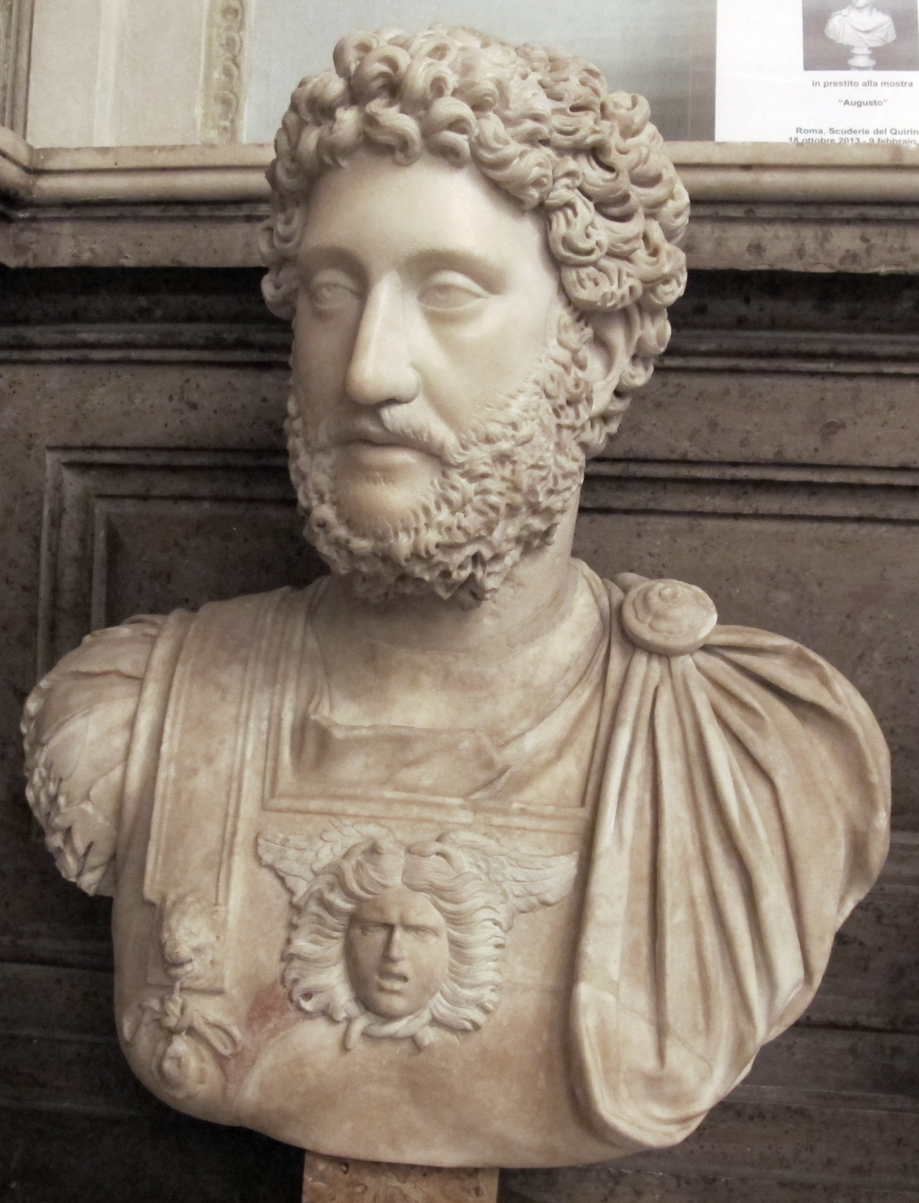 Musei Capitolini